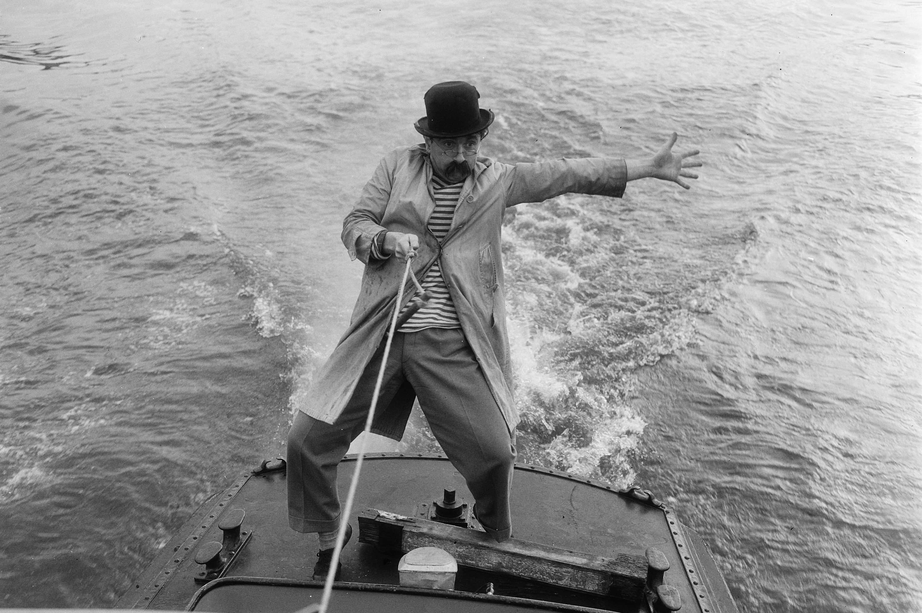 Collectie / Archief : Fotocollectie Anefo Reportage / Serie : [ onbekend ] Beschrijving : Tom Manders (als Dorus), waterskiënd op de Amstel Datum : 17 november 1955 Trefwoorden : waterskiën Persoonsnaam : Dorus, Manders, Tom Fotograaf : Rossem, Wim van / Anefo Auteursrechthebbende : Nationaal Archief Materiaalsoort : Glasnegatief Nummer archiefinventaris : bekijk toegang 2.24.01.09 Bestanddeelnummer : 907-4384